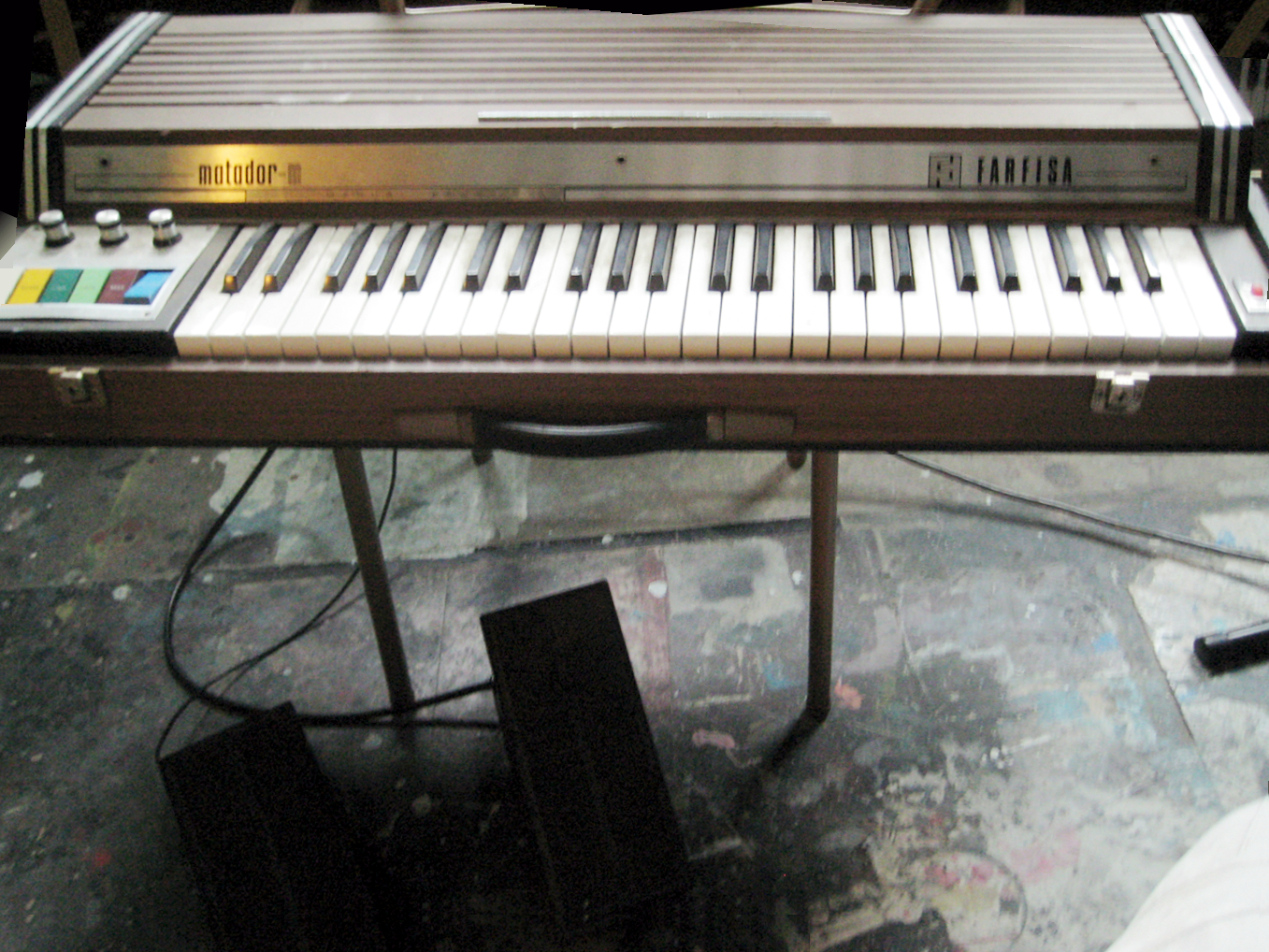 Farfisa Matador M combo organ (c.1973 ?)